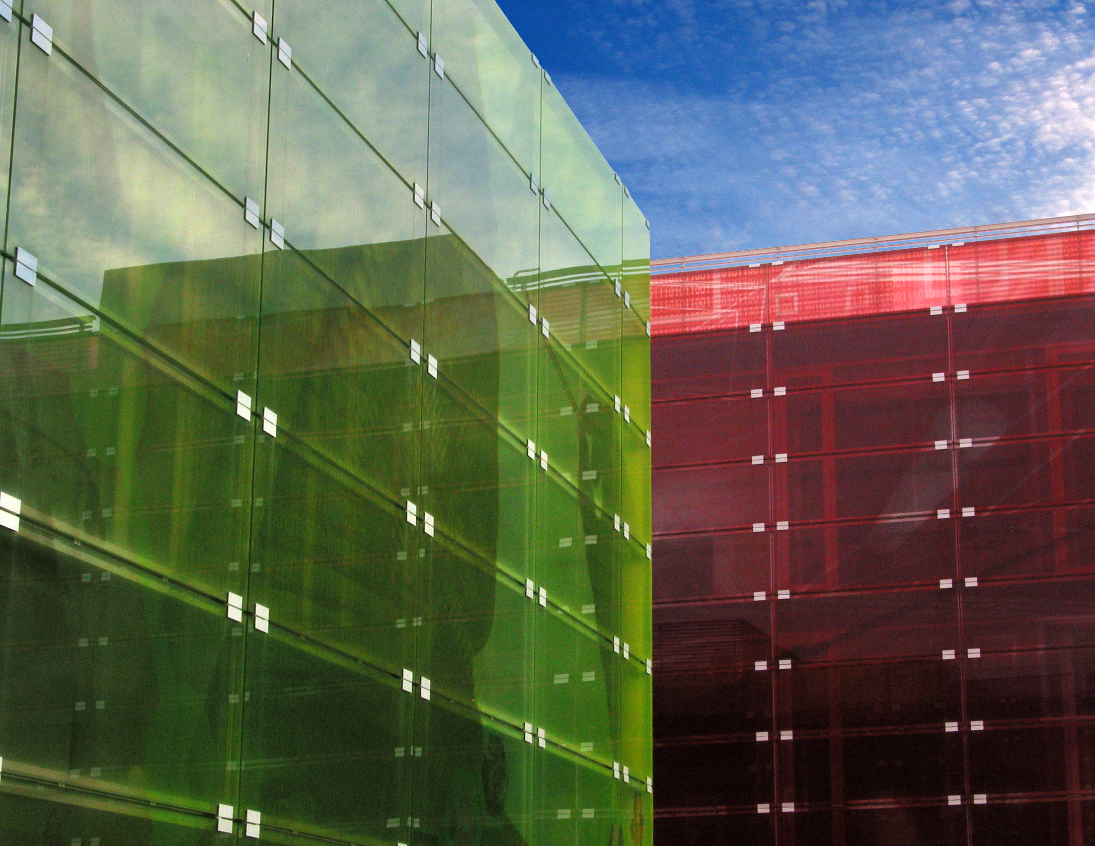 Edificios de la Ciudad de la Innovación, Universidad Politécnica de Valencia — en el campus de Vera, Valencia.